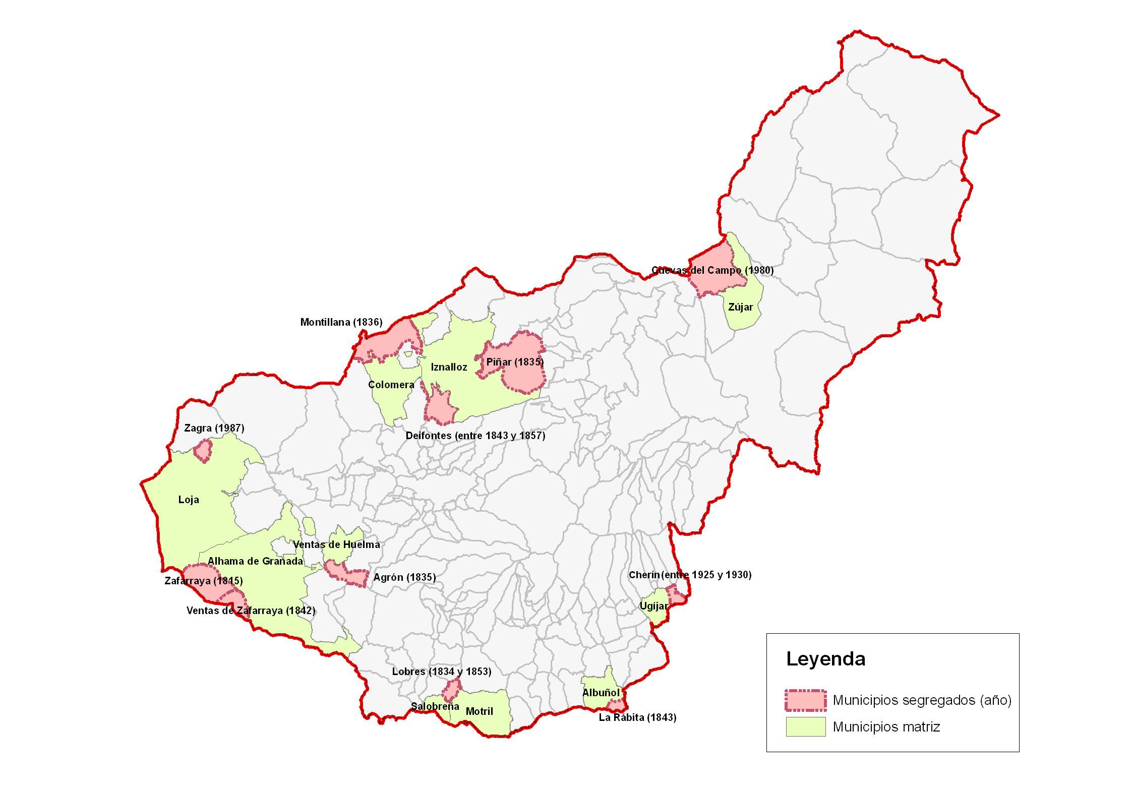 Segregación de términos municipales en la provincia de Granada.